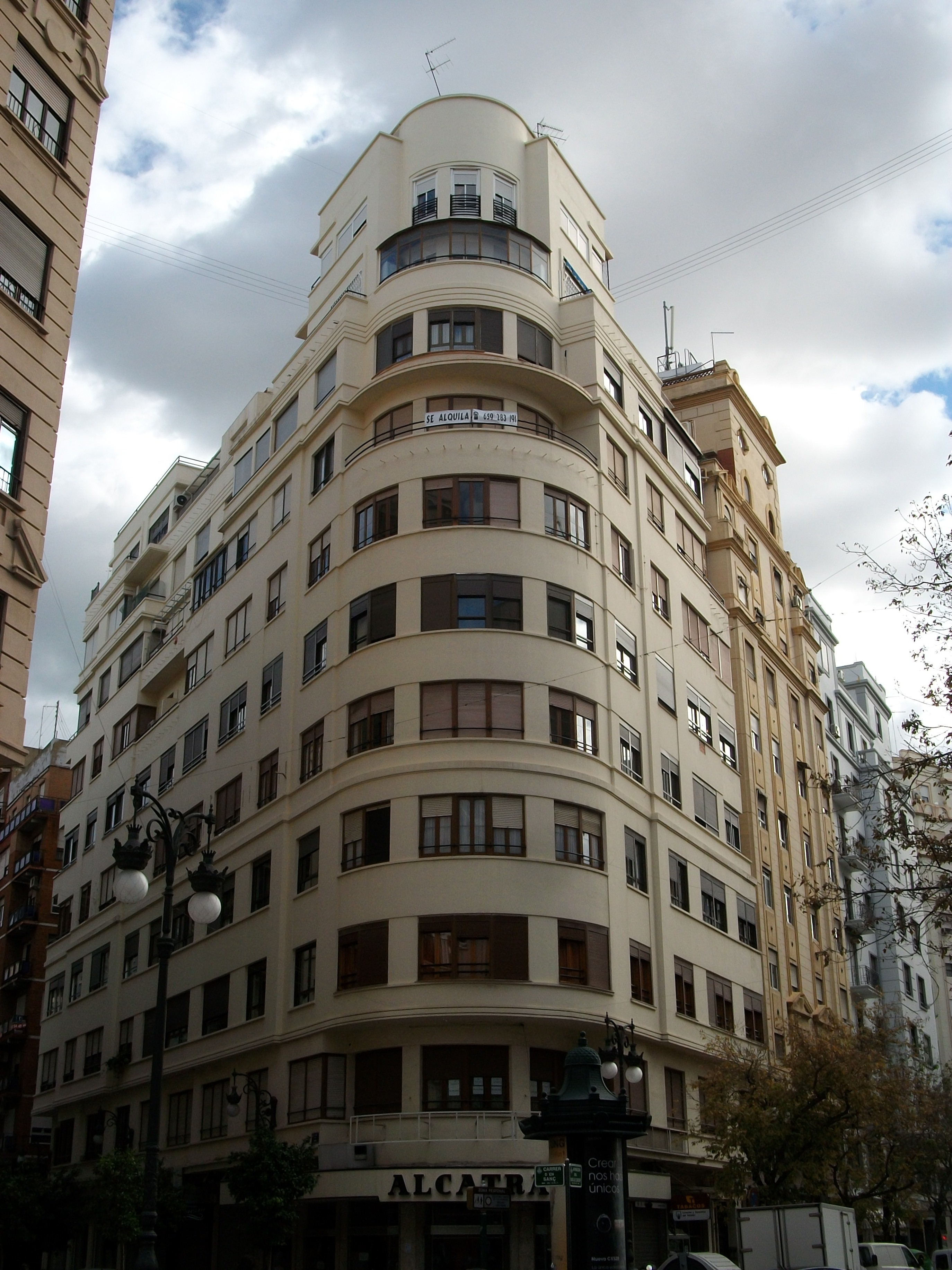 Edifici Martí Cortina a l'Avinguda de l'Oest de la ciutat de València, arquitecte: Xavier Goerlich.